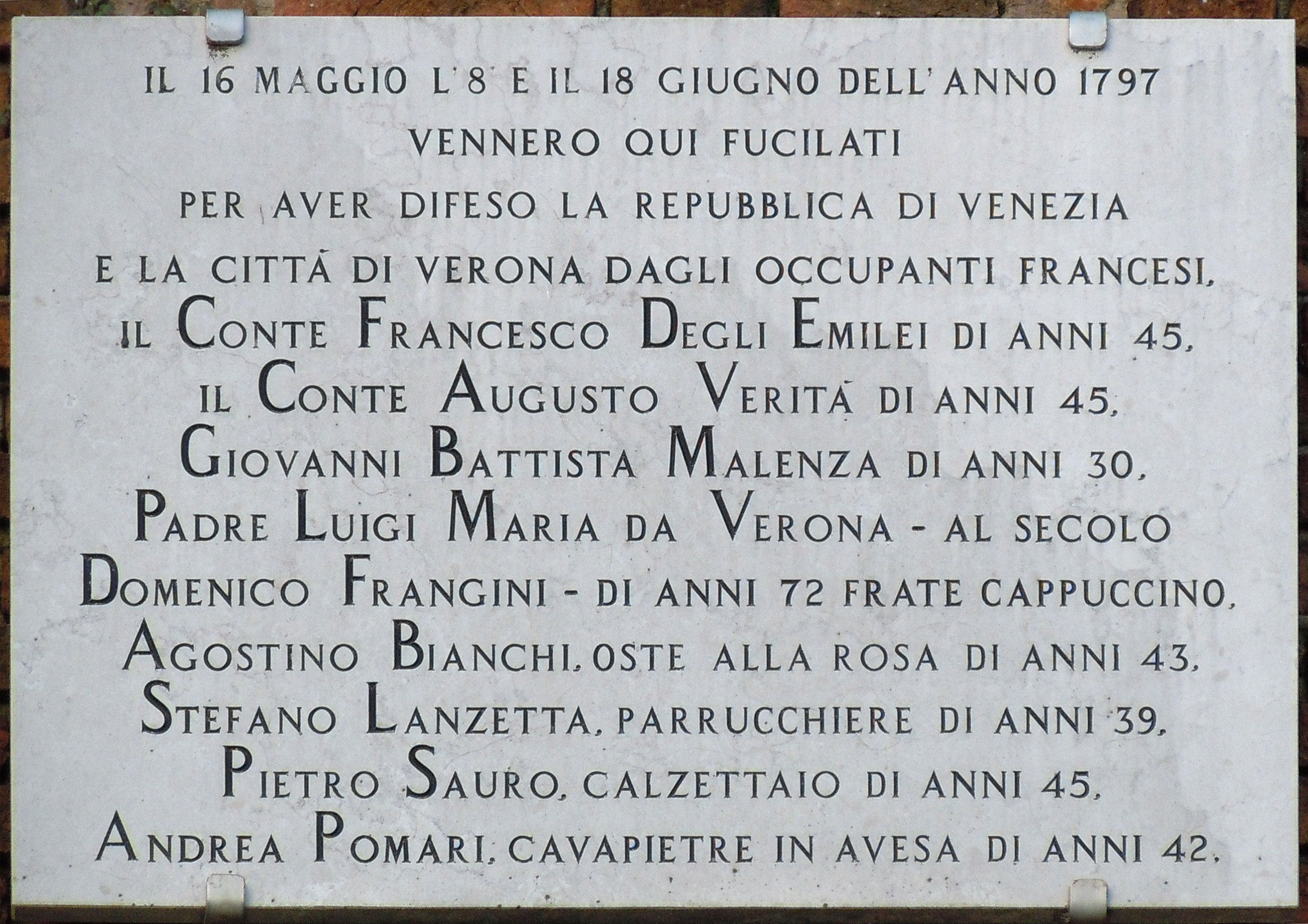 Verona, lapide ai martiri del 1797.